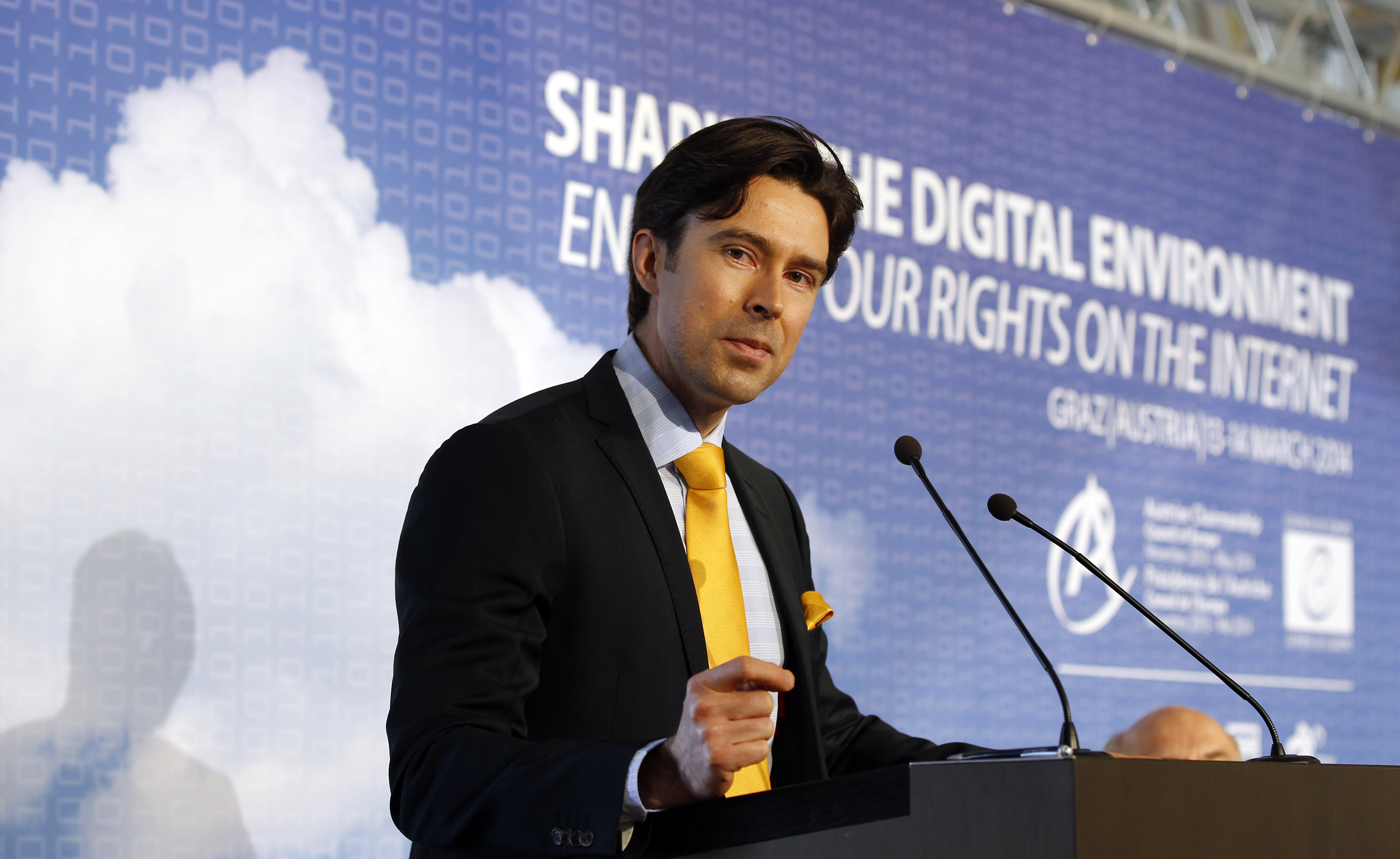 Am 13. und 14. März 2014 - fand anlässlich des österreichischen Vorsitzes im Europarat eine vom BMeiA, dem Bundeskanzleramt und dem Europarat organisierte ExpertInnenkonferenz „Shaping the Digital Environment - Ensuring our Rights on the Internet“ in Graz statt. Foto: Moderator Jussi-Pekka Rantanen, "TV News presenter at the Finnish Broadcasting Company" Foto:Mahmoud